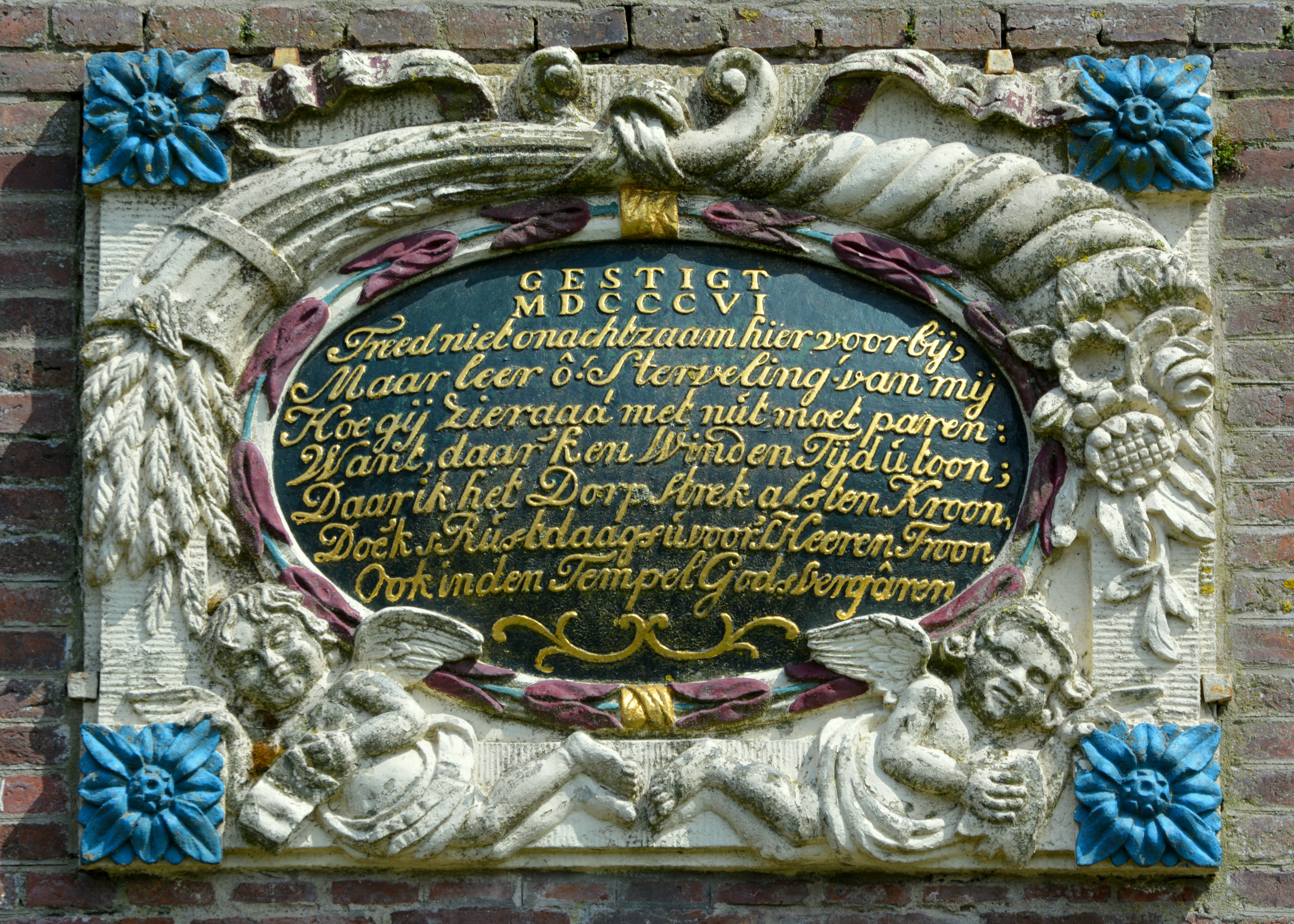 Hallum, Sint Martinuskerk, gevelsteen